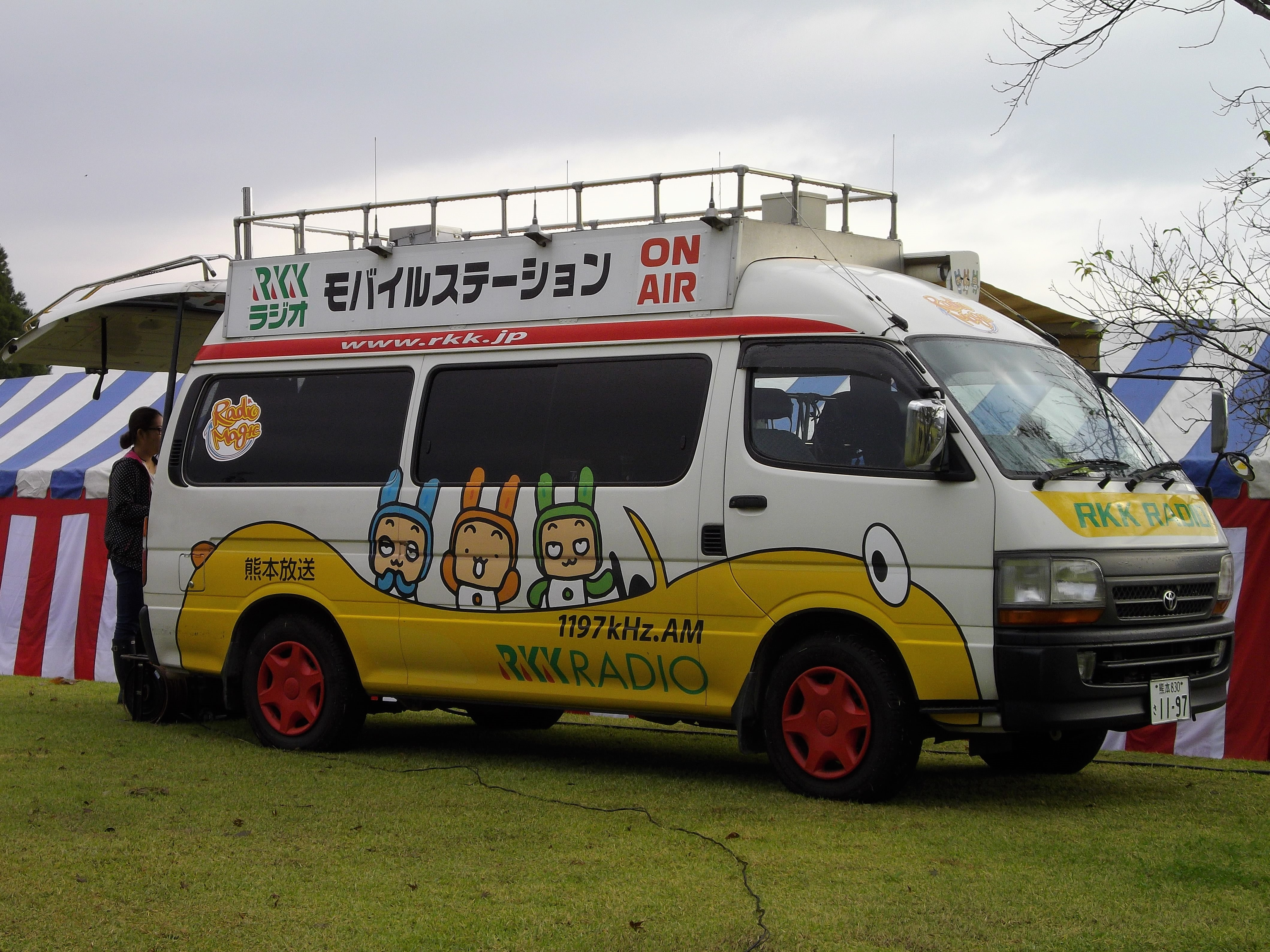 2000年ごろから2014年末まで使われた熊本放送のラジオカー、熊本市南区城南町にて撮影